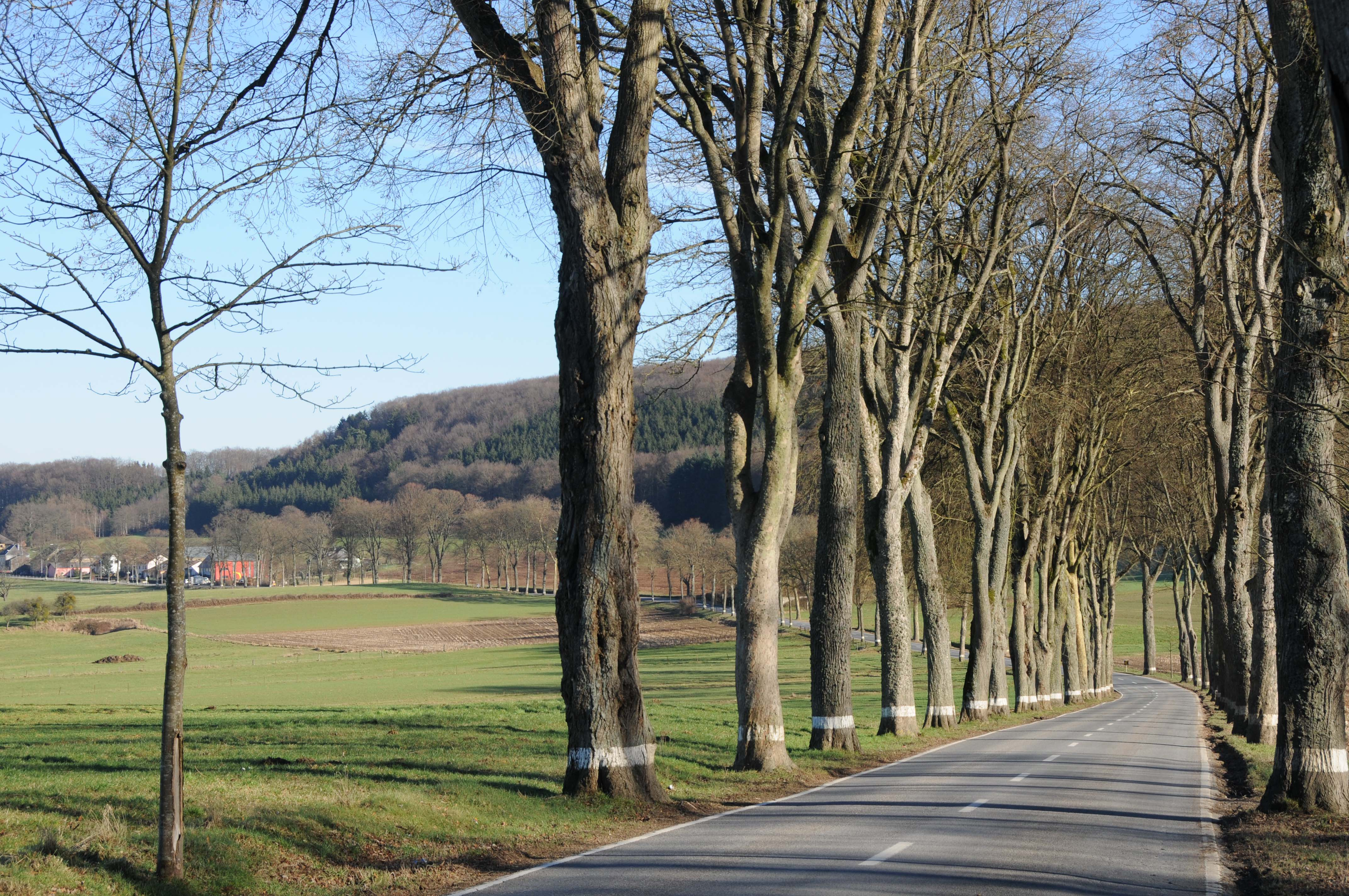 Allé ved Bruch ved Sëll.